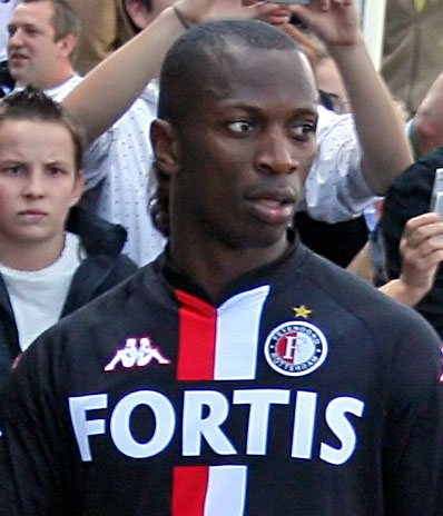 Romeo Castelen (Feyenoord)